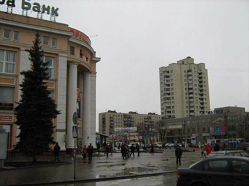 г. Хмельницкий. Площадь перед старым универмагом